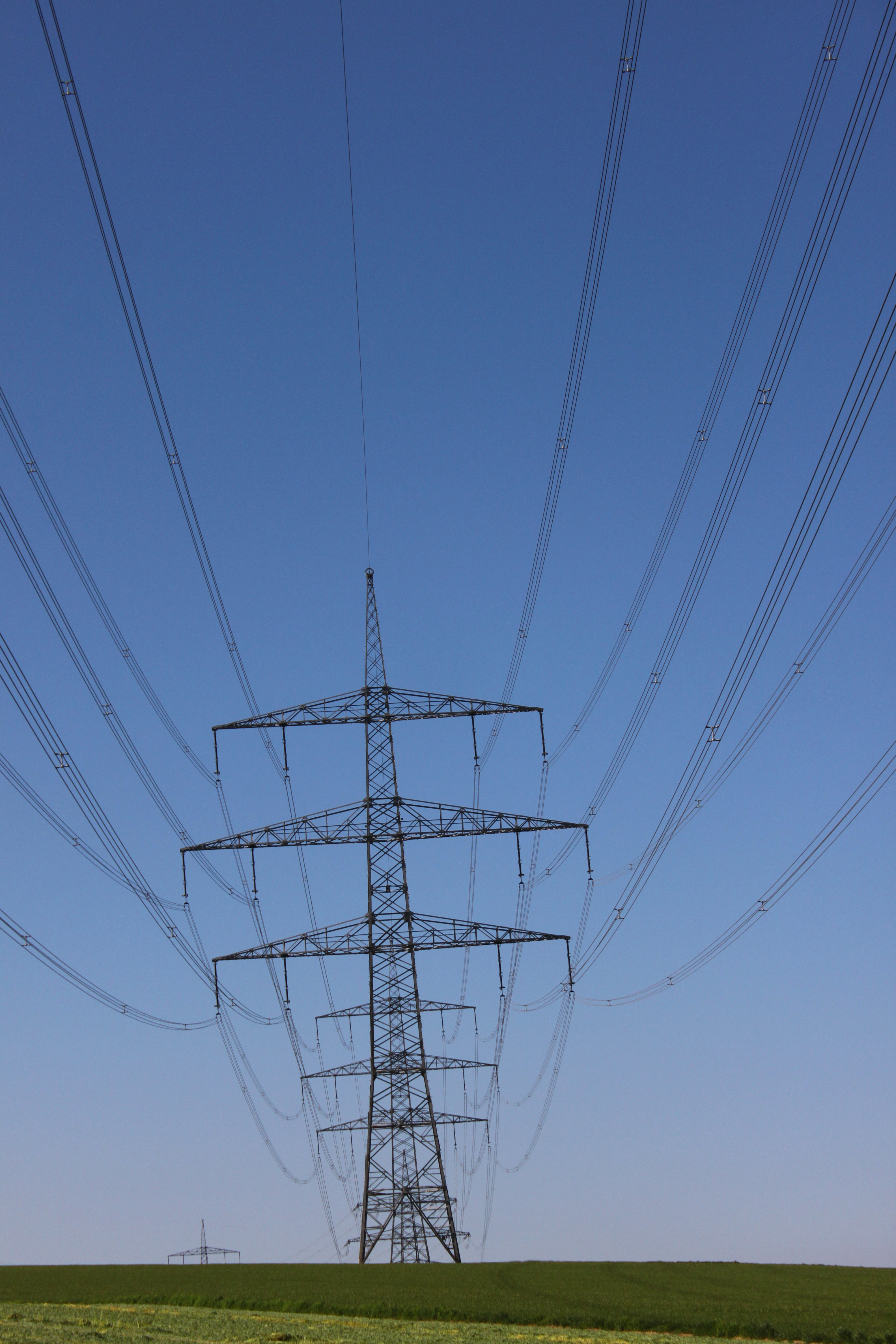 Hochspannungsmasten (380 kV) südlich von Hochstadt am Main (ehem. Trasse der Reichssammelschiene zwischen Würgau und Remptendorf)